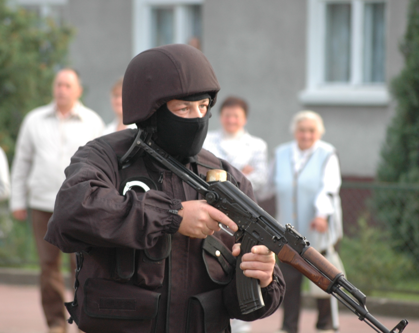 Antyterrorysta w Wolinie